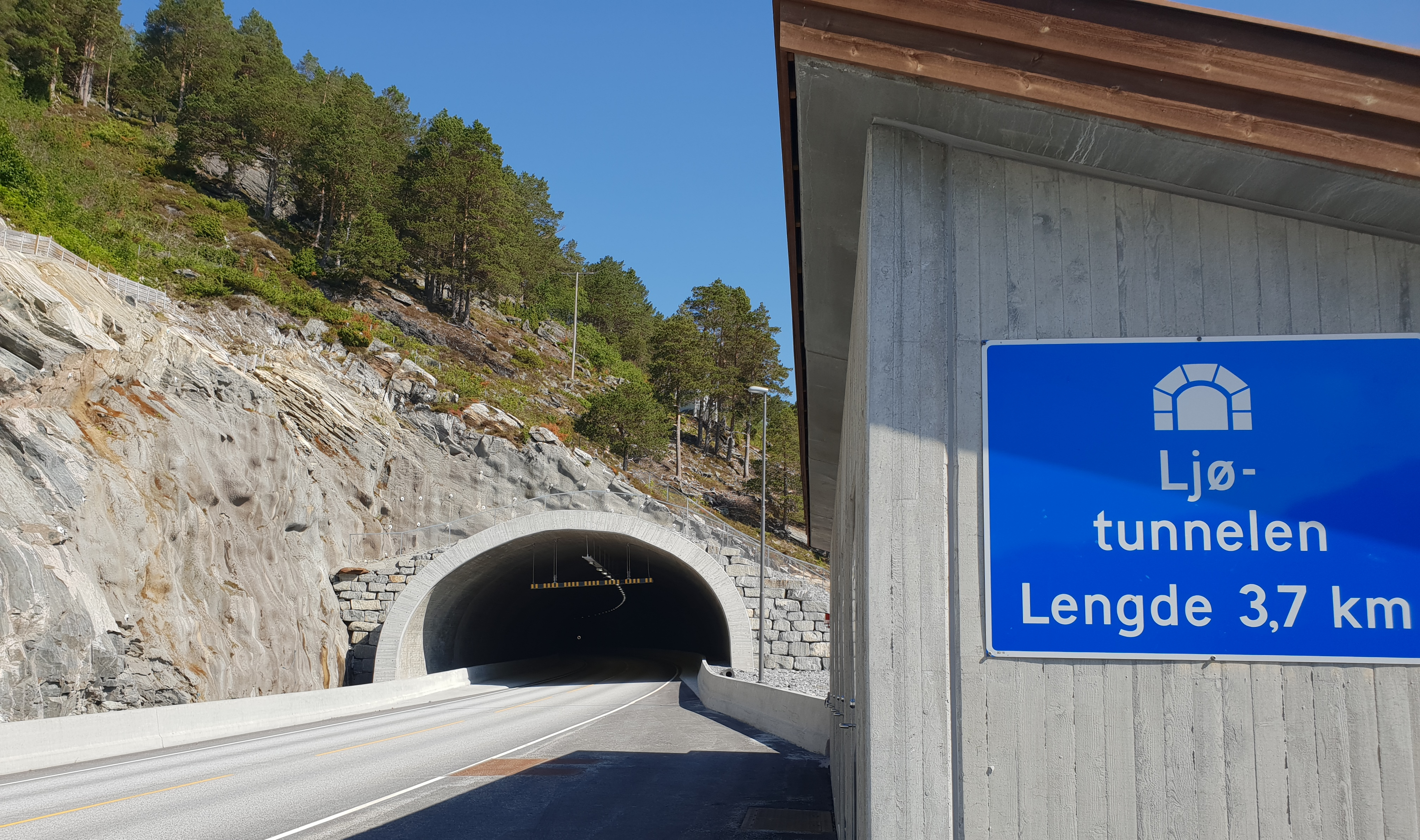 Ljøtunnelens søndre innslag ved Hellesylt